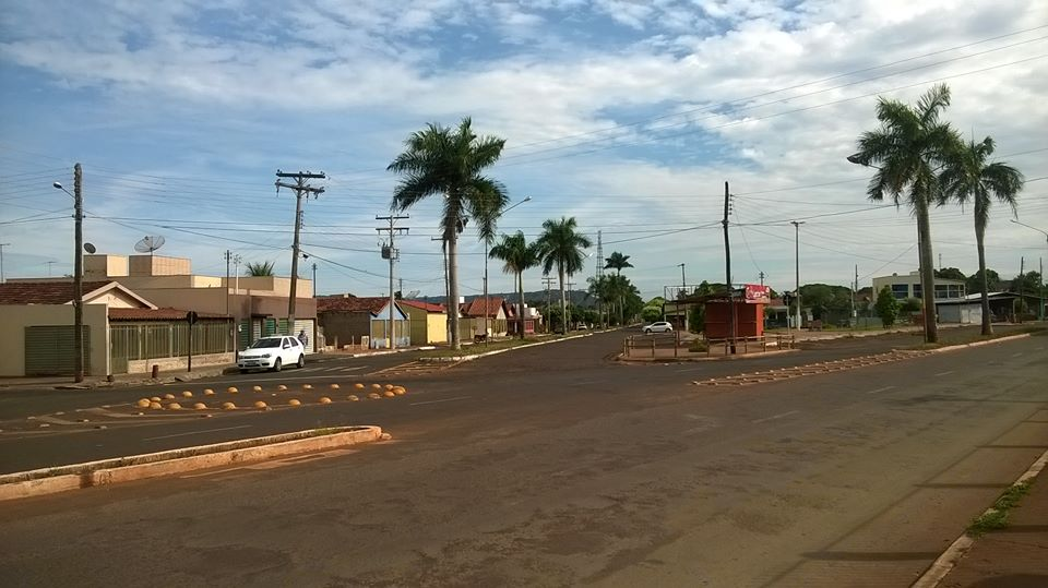 Bairro Promissão